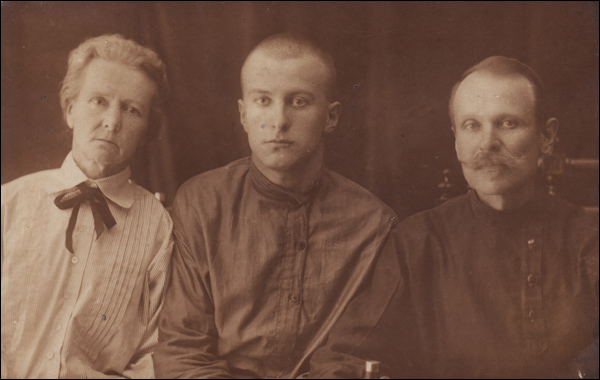 Антон Адамовіч з бацькамі. 1930-я гг.